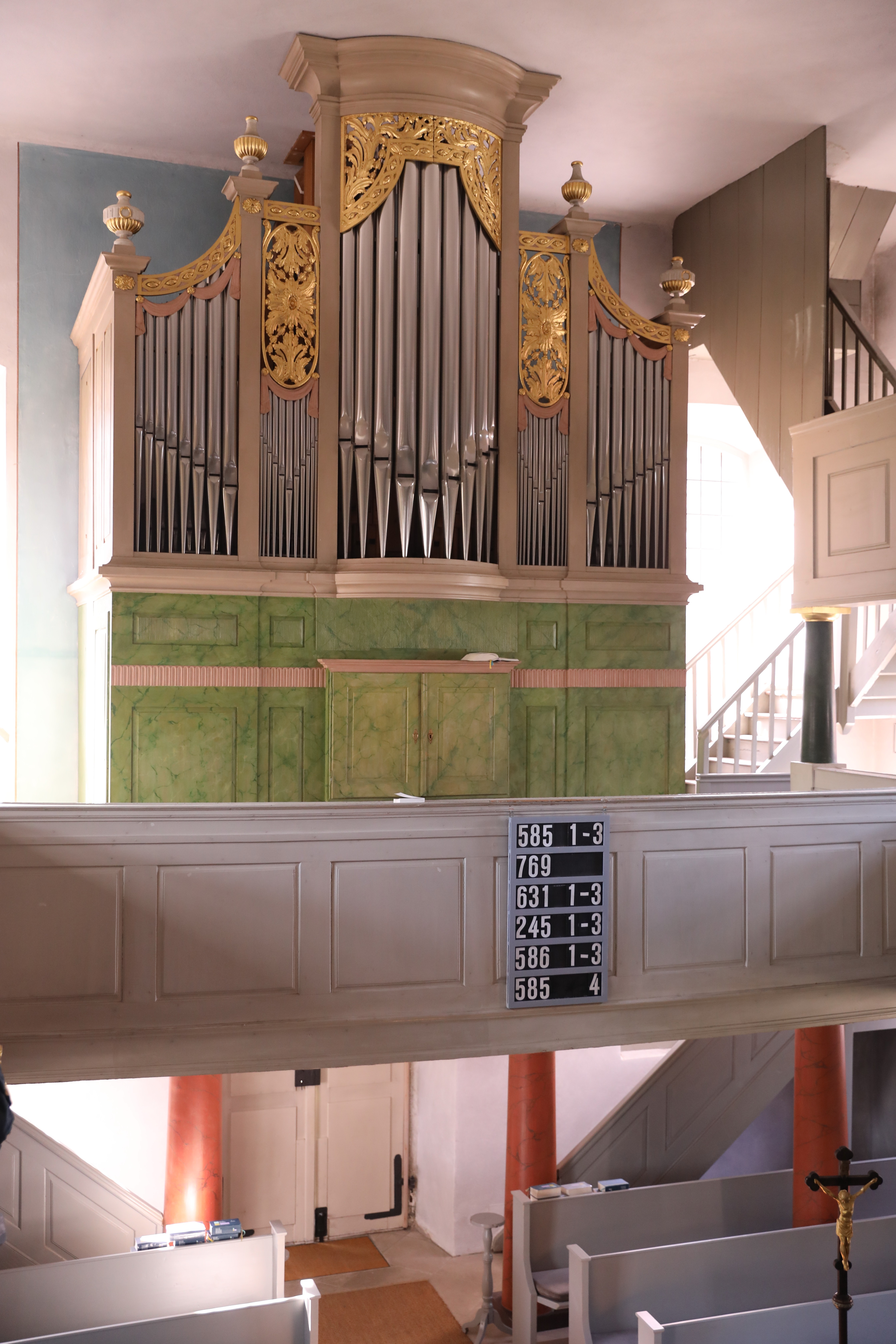 Evangelisch-lutherische Pfarrkirche Gleußen, 1836. Tag des offenen Denkmals.